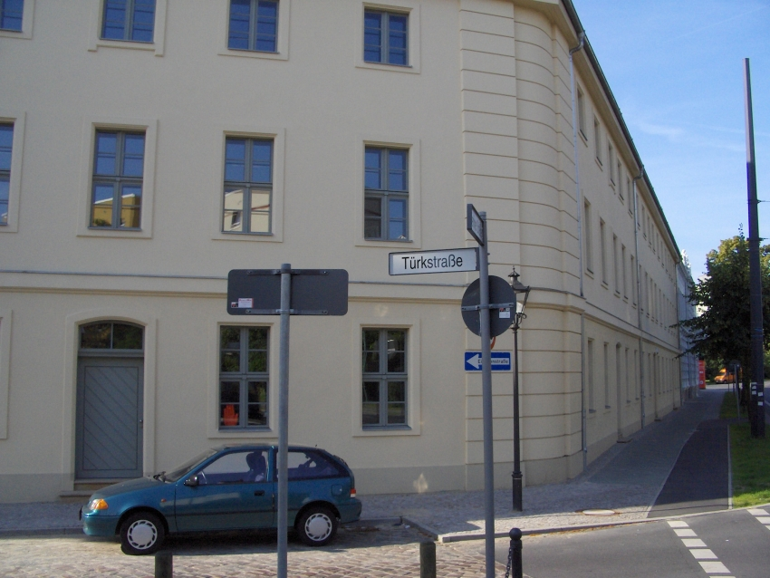 „Garde-Jäger-Kaserne“ (auch „Beweibten-Kaserne“ genannt) des Garde-Jäger-Bataillon an der Ecke Türkstraße und Berliner Straße in Potsdam. Das Gebäude wurde Mitte des 18. Jahrhunderts von Heinrich Ludwig Manger errichtet. Im Zweiten Weltkrieg wurde es teilweise zerstört und in den Jahren 2004 und 2005 rekonstruiert. Danach diente es dem Energiekonzern E.DIS als Verwaltungssitz im Land Brandenburg.(aus wp)